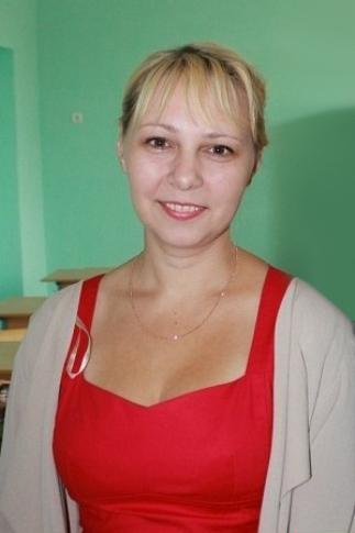 Действующий директор гимназии им.С.В.Ковалевской, г.Великие Луки